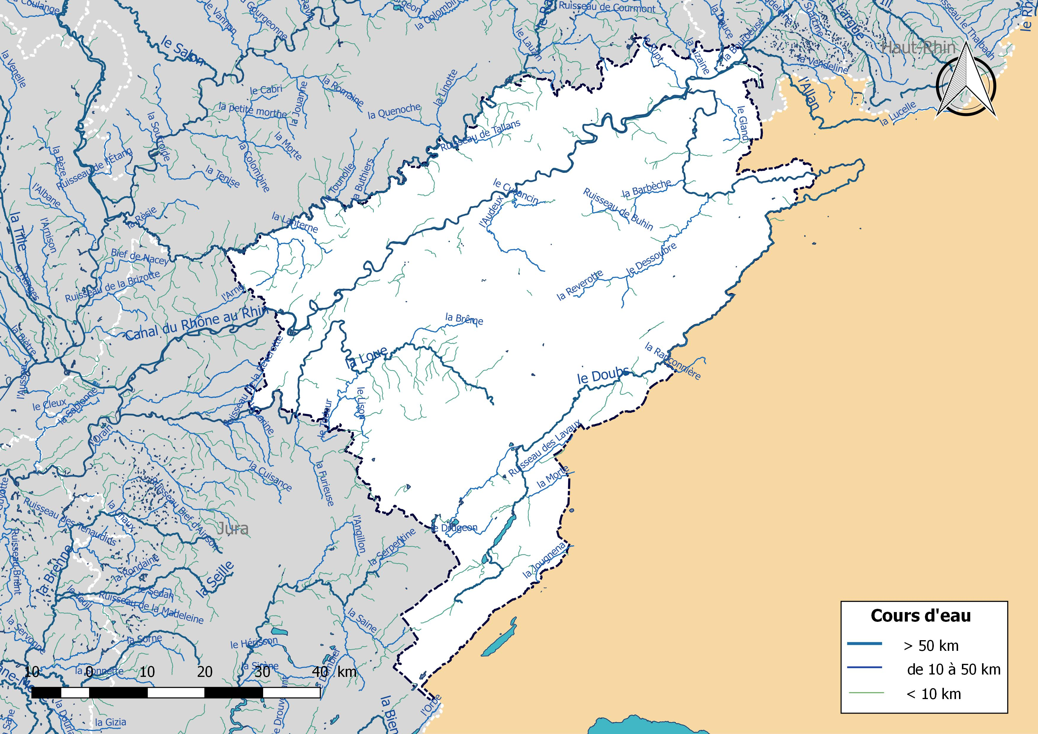 Réseau hydrographique du département du Doubs (France).